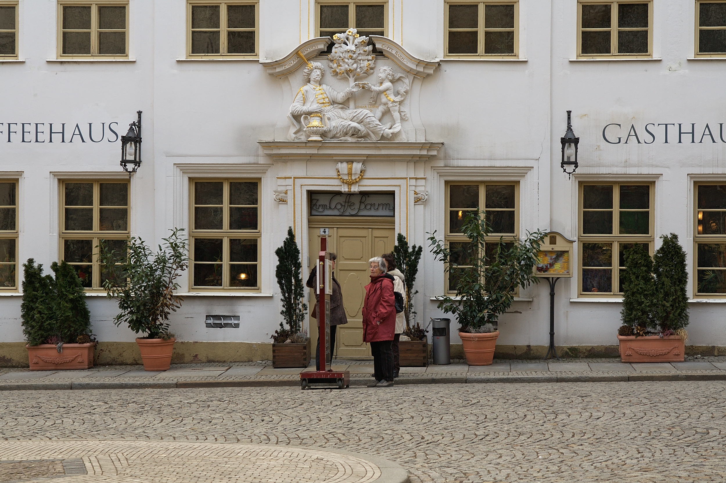 Museum "Zum Arabischen Coffe Baum" in Leipzig